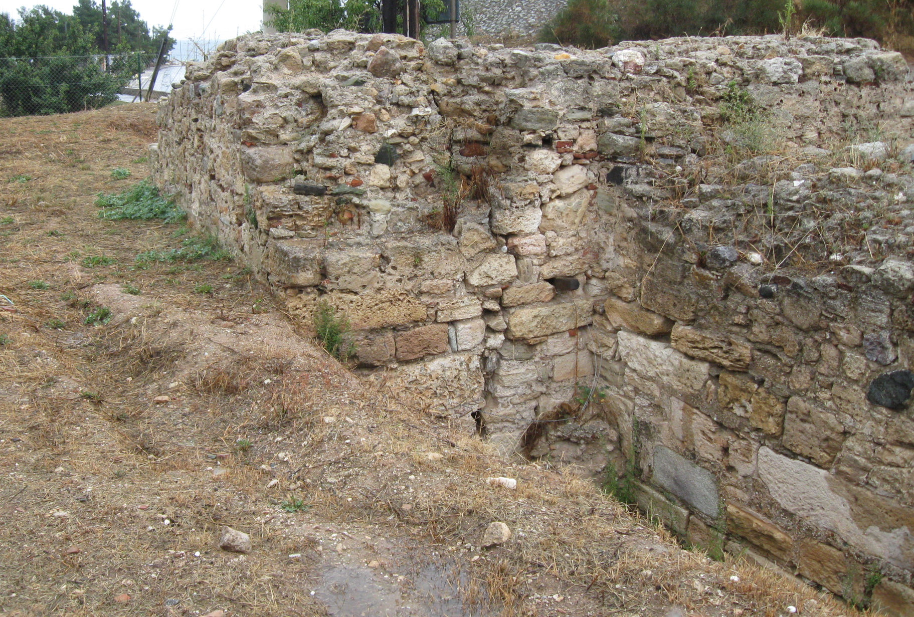 Stadtmauer des antiken Potidea